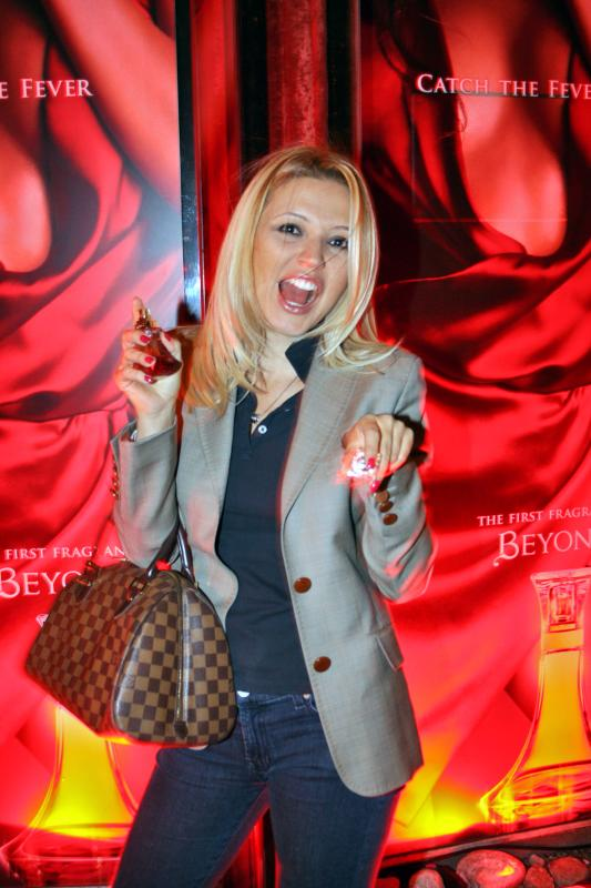 A atriz Patrícia de Sabrit no lançamento do perfume Heat da cantora Beyoncé no Brasil.